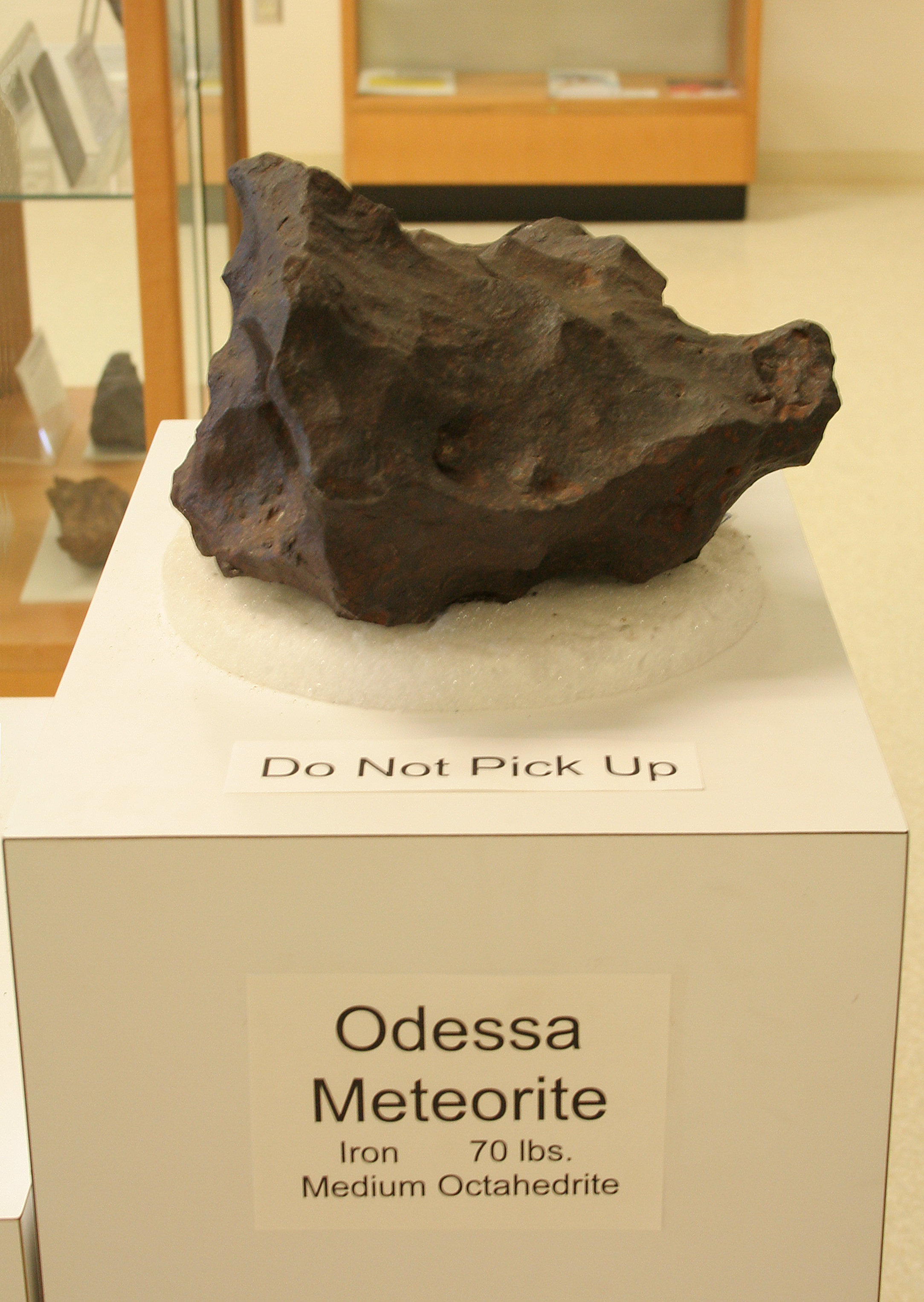 Odessa (iron) meteorite, 70 pounds sample